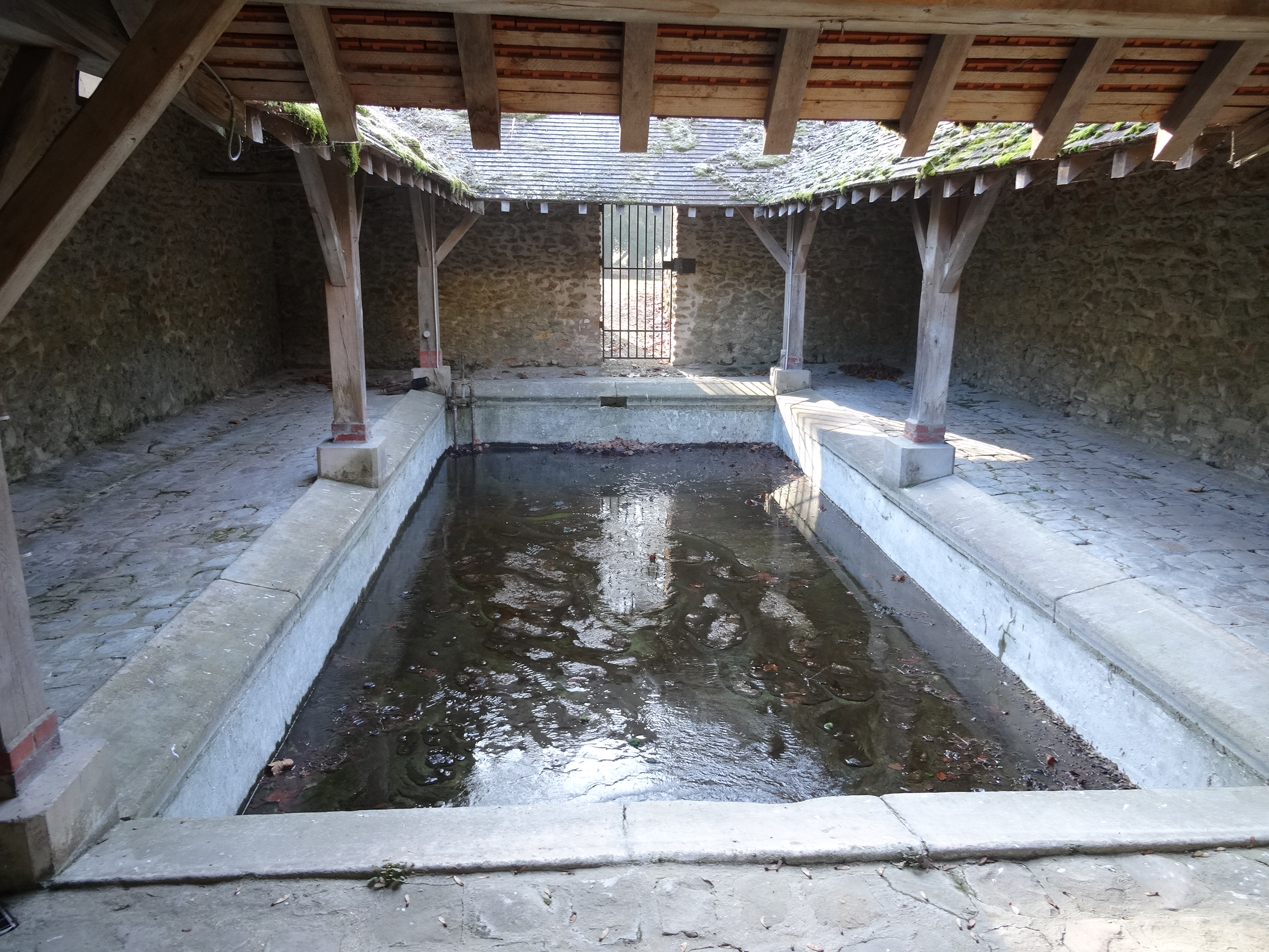 Lavoir de Ferrières-en-Brie. (Seine-et-Marne, région Île-de-France).